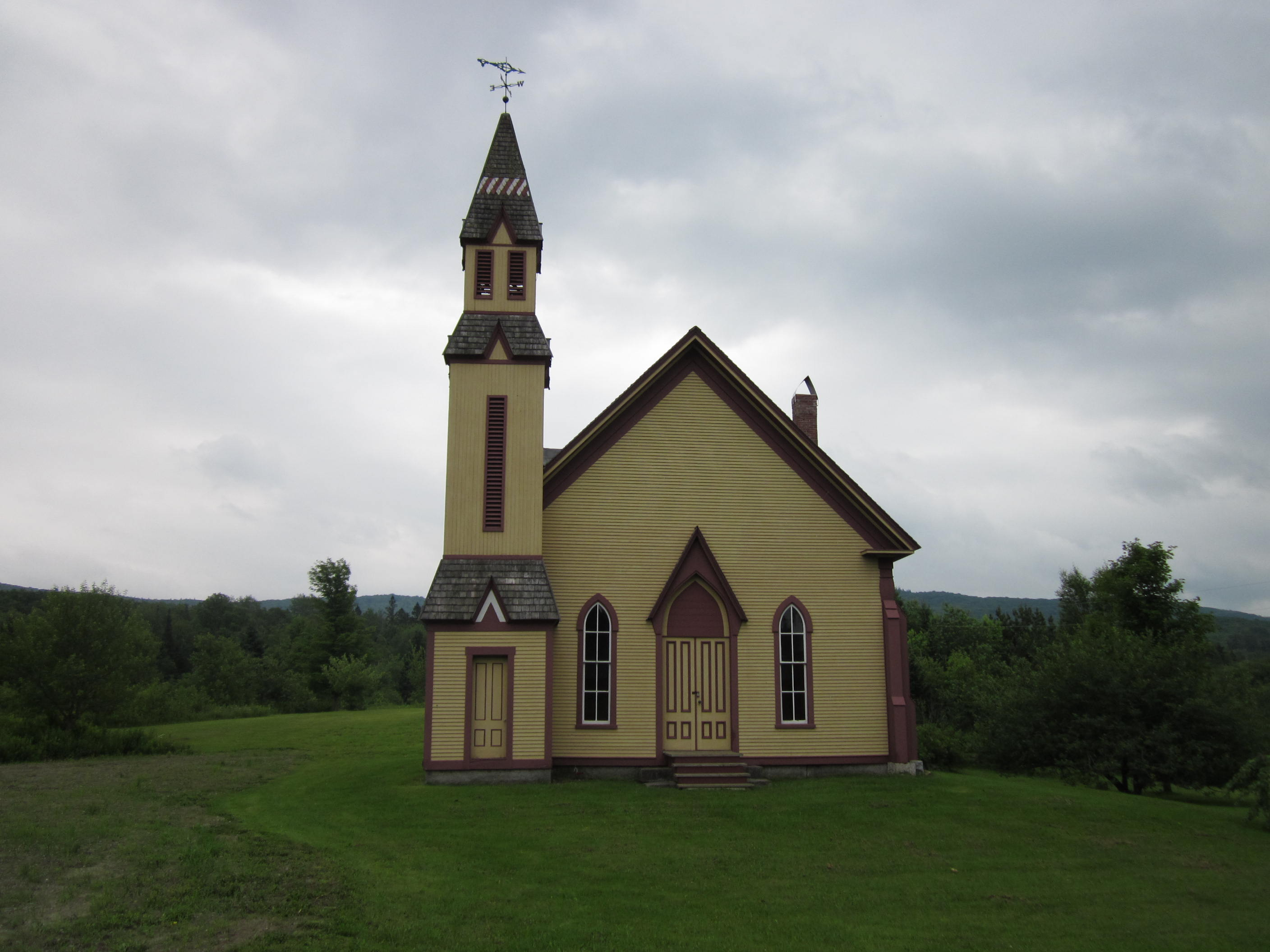 Church in Stannard, Vermont